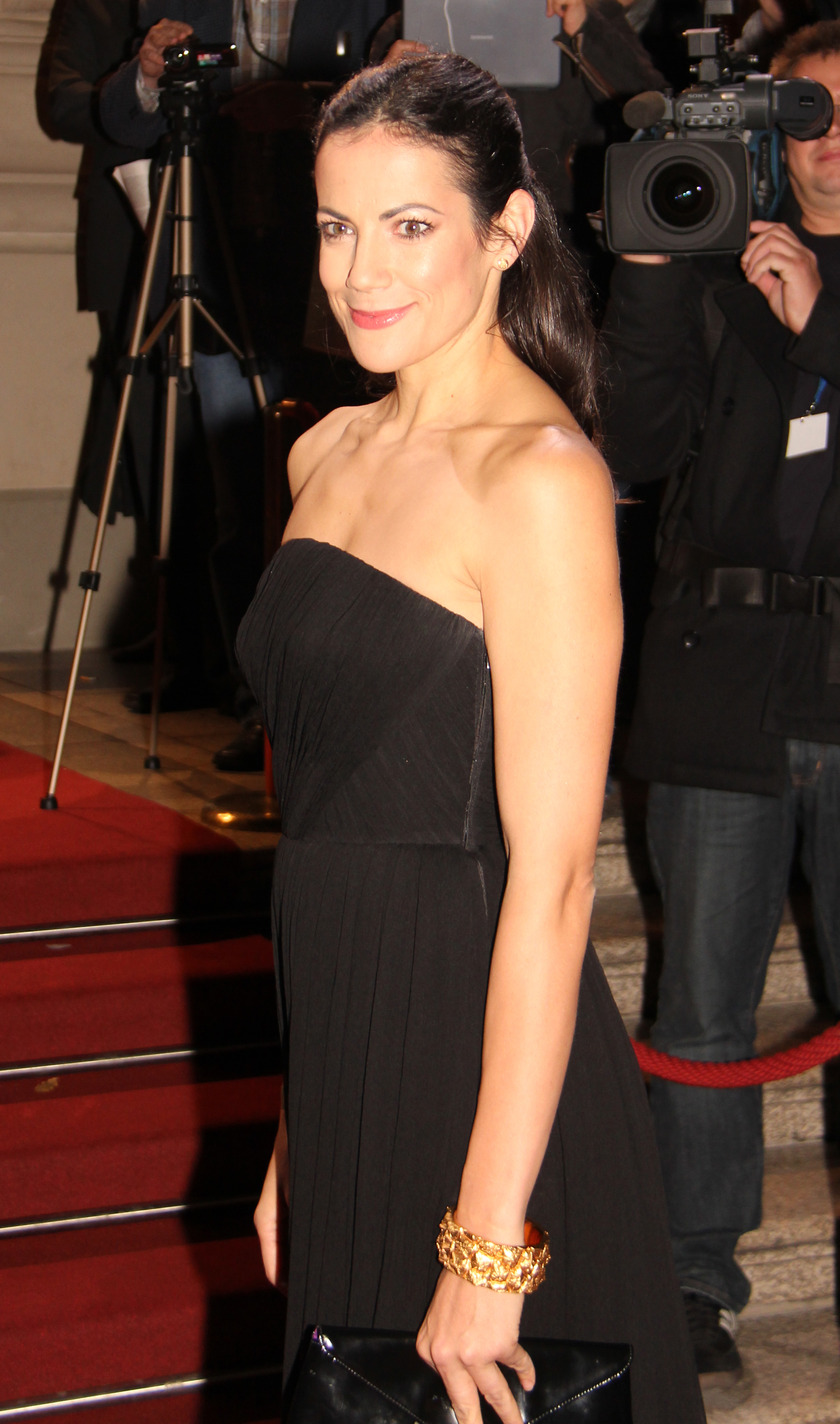 Bettina Zimmermann beim Hessischen Film- und Kinopreis 2012